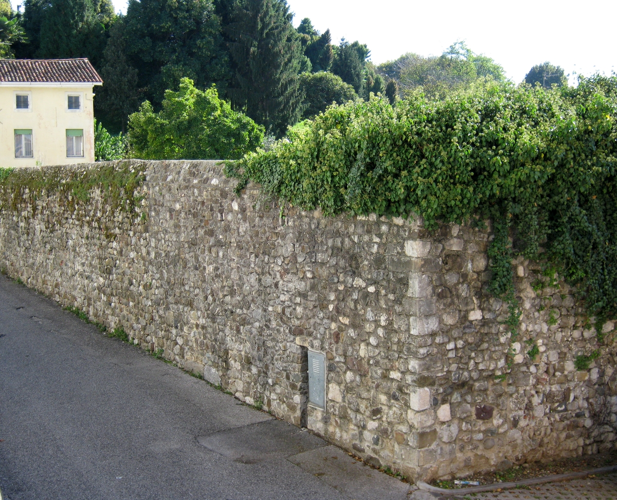 Resti del muro di cinta medievale di Tricesimo (Udine)